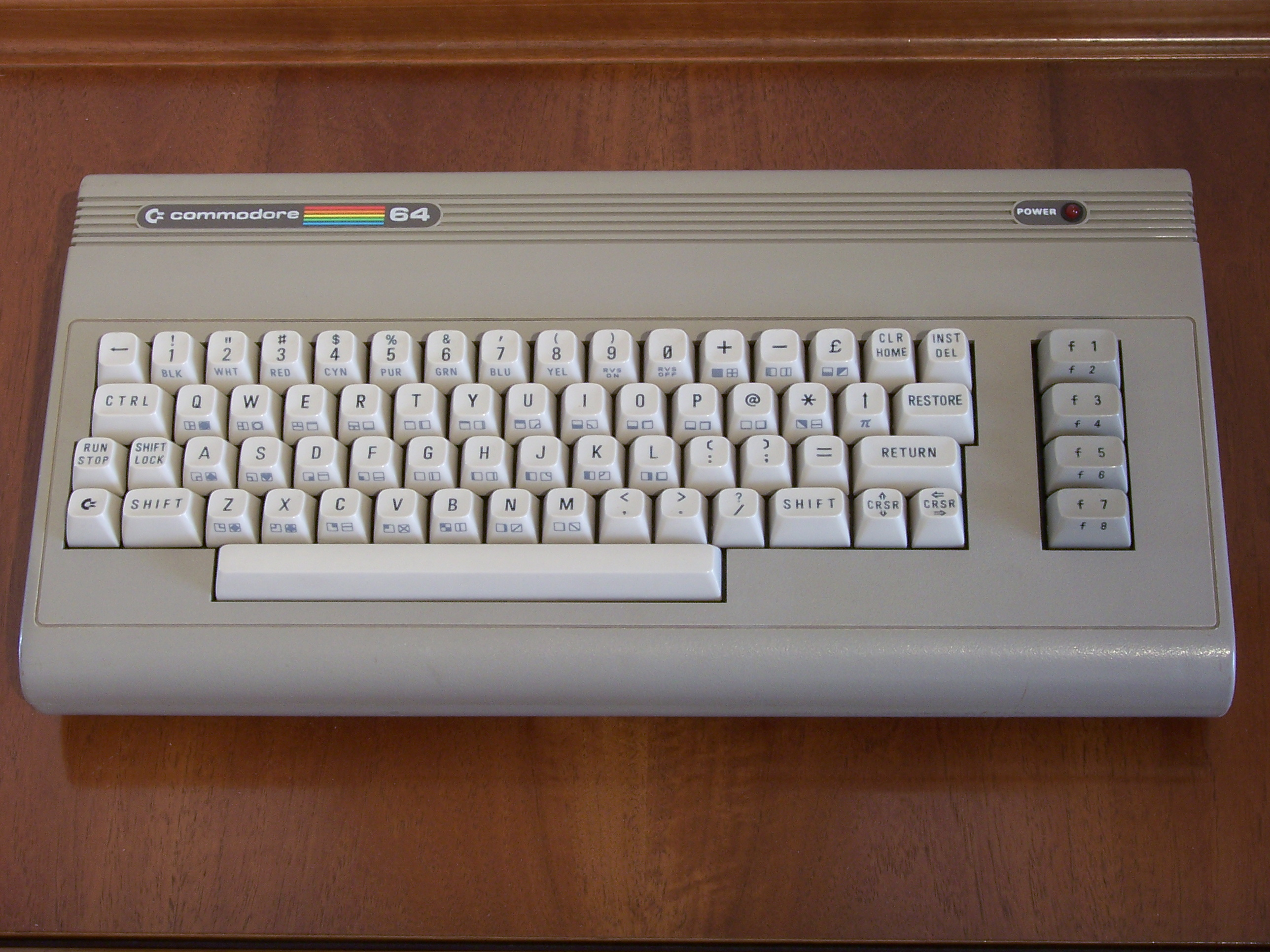 Autore: Matteo Caccia Fonte: collezione privata Descrizione: Commodore 64 - 1987 - Made in USA - versione "ALDI" (nome non ufficiale) Autirizzo l'uso in Wikipedia secondo la licenza indicata.